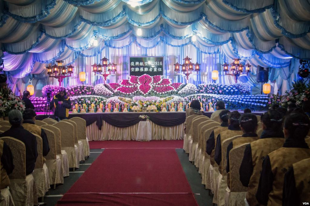 中文（台灣）: 臺北市第二殯儀館為空難罹難者設置的靈堂。